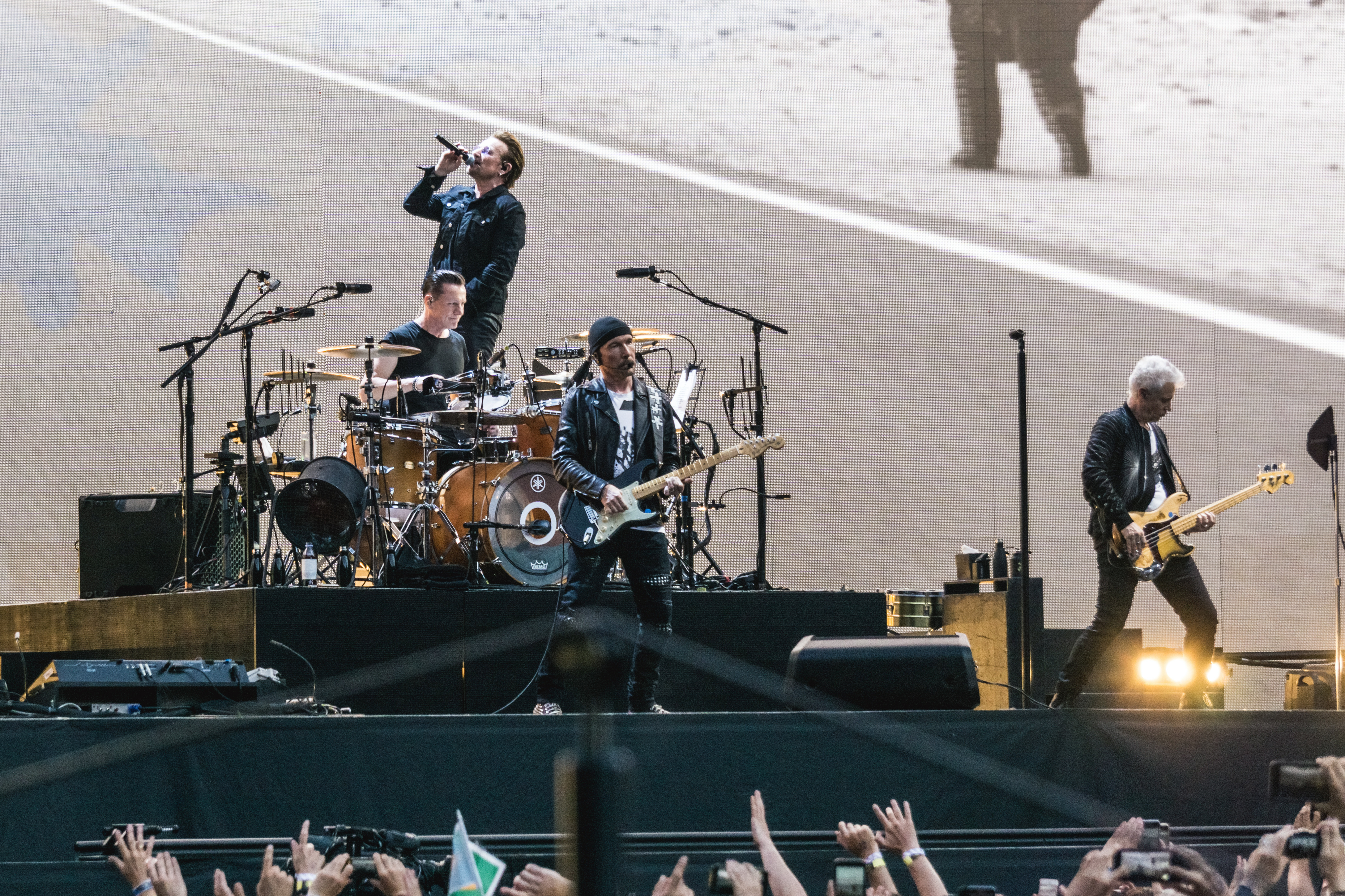 U2Twick090717-19